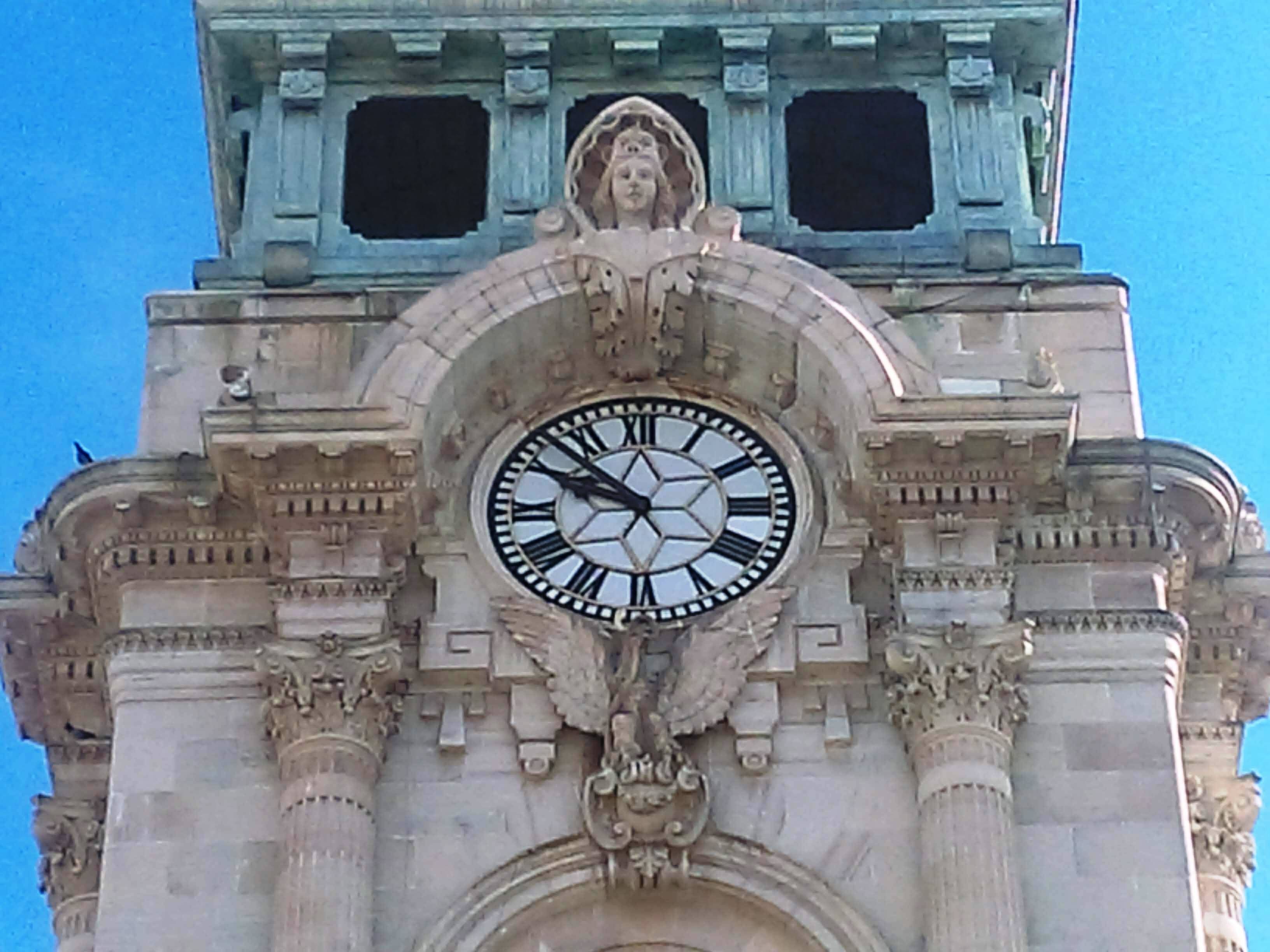 Reloj Monumental de Pachuca